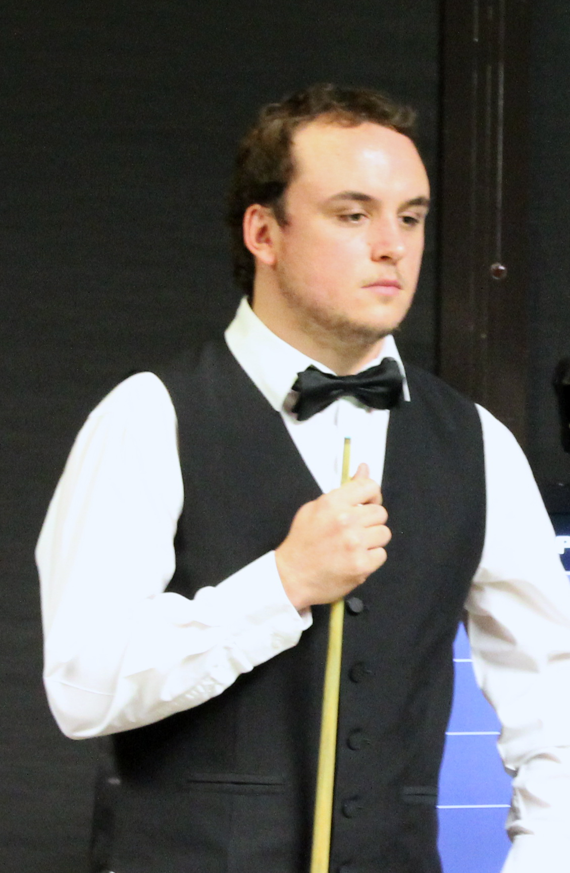 Sam Baird beim Paul Hunter Classic 2016